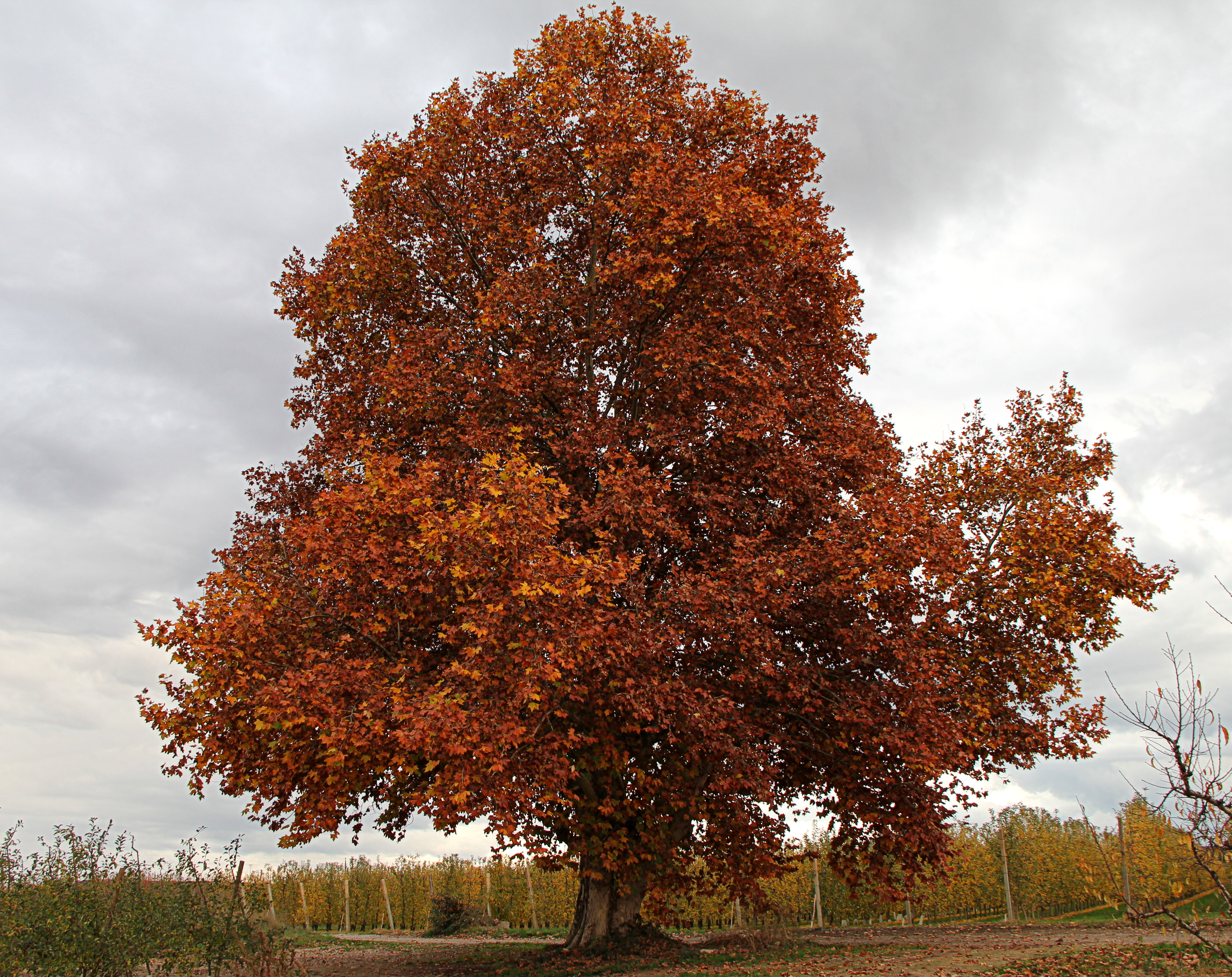 Arbre monumental,amb 23 m. d'alçària,el trobem a la vora del camí enmig d'arbres fruiters A la tardor cambia de color i passa del verd intens a tons marró i groc.